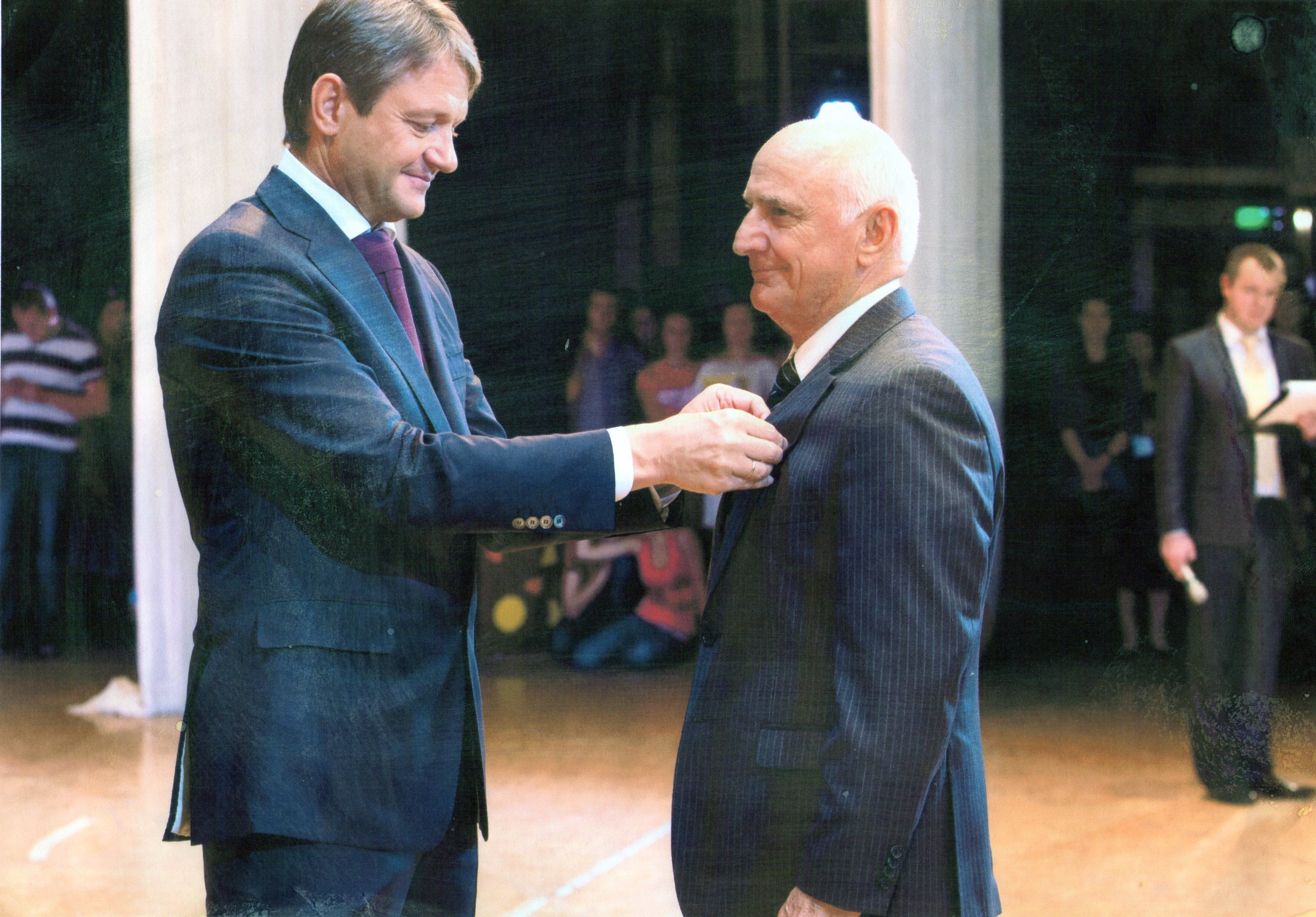 А. Н. Ткачев присуждает Б. С. Гегечкори первую премию администрации Краснодарского края в области науки, образования и культуры за создание учебного пособия “Практикум по плодоводству“